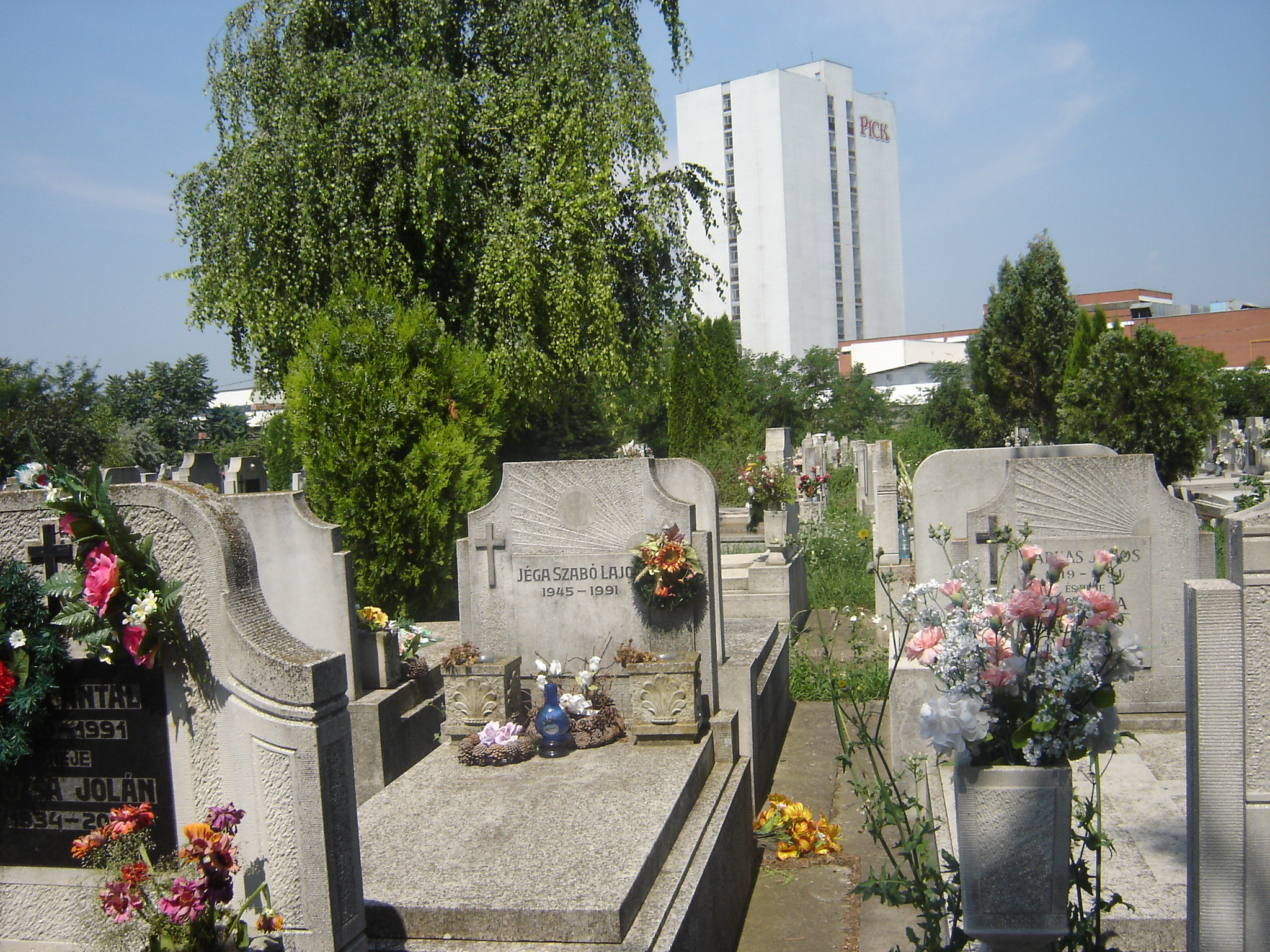 Neobarokk síkövek egy-egy legyezővel éppen úgy, mint a házaknál a háromszögletű oromzat sarkaiban (Szeged-alsóvárosi temető)